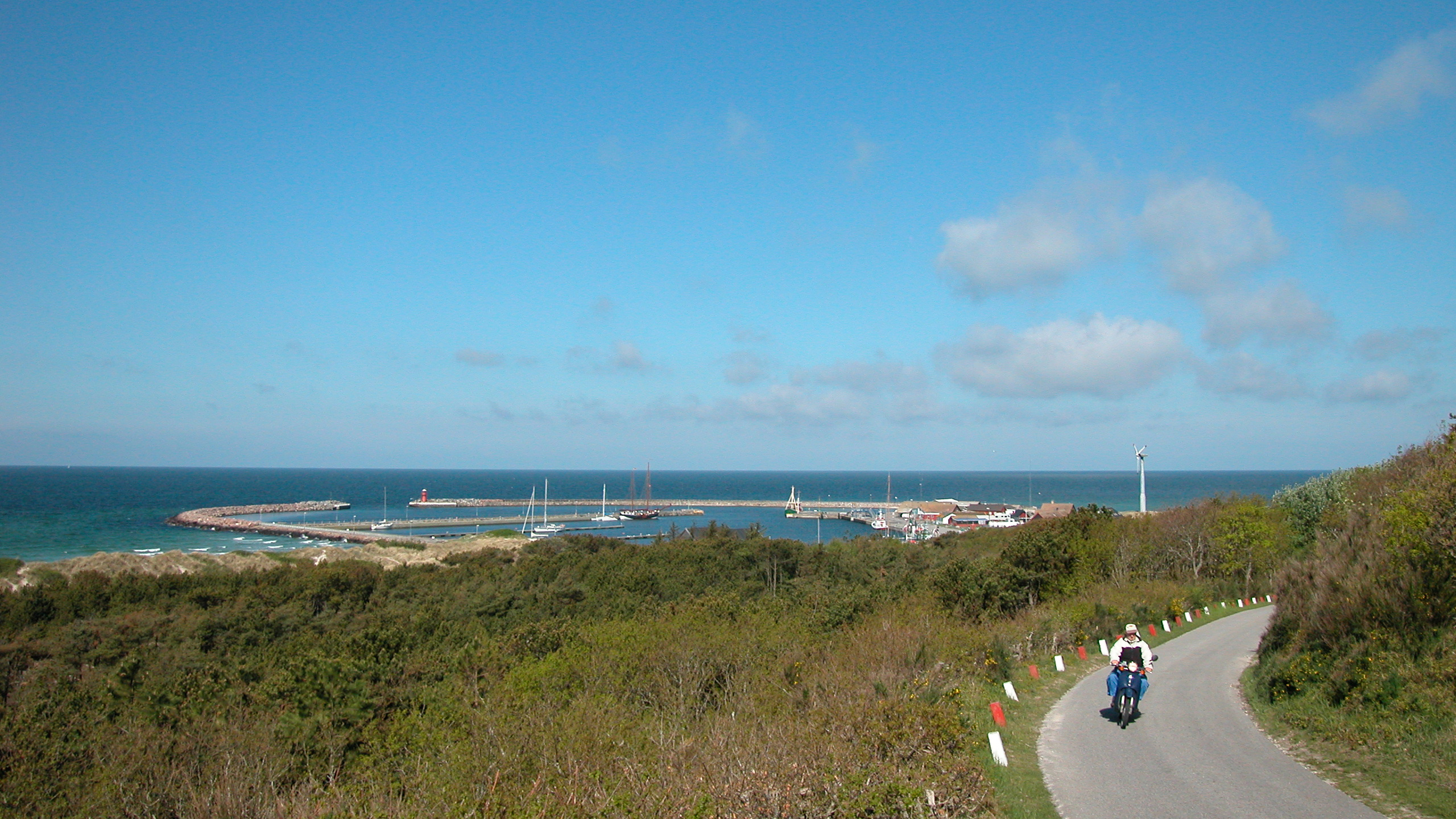 Anholt Blick auf den Hafen, aufgenommen Mai 2005